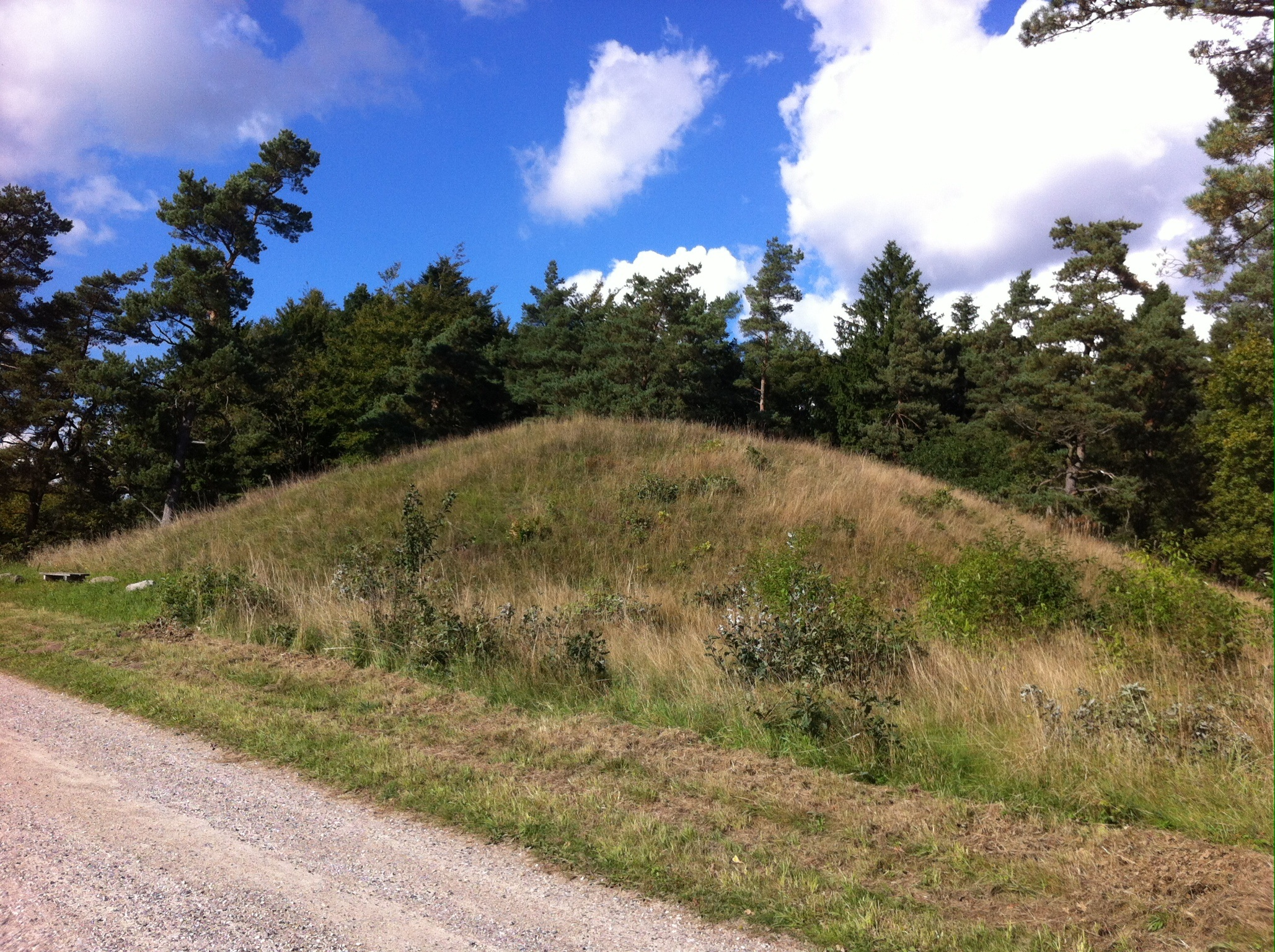 Gravhøjen Lindhøj i Linddalene ved Hadsund